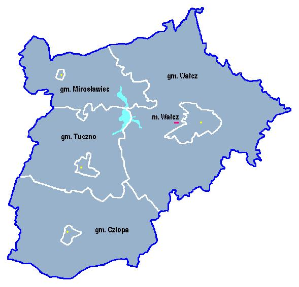 Locator maps for communes in województwo zachodniopomorskie : Zwa gminy.jpg (podział na gminy)